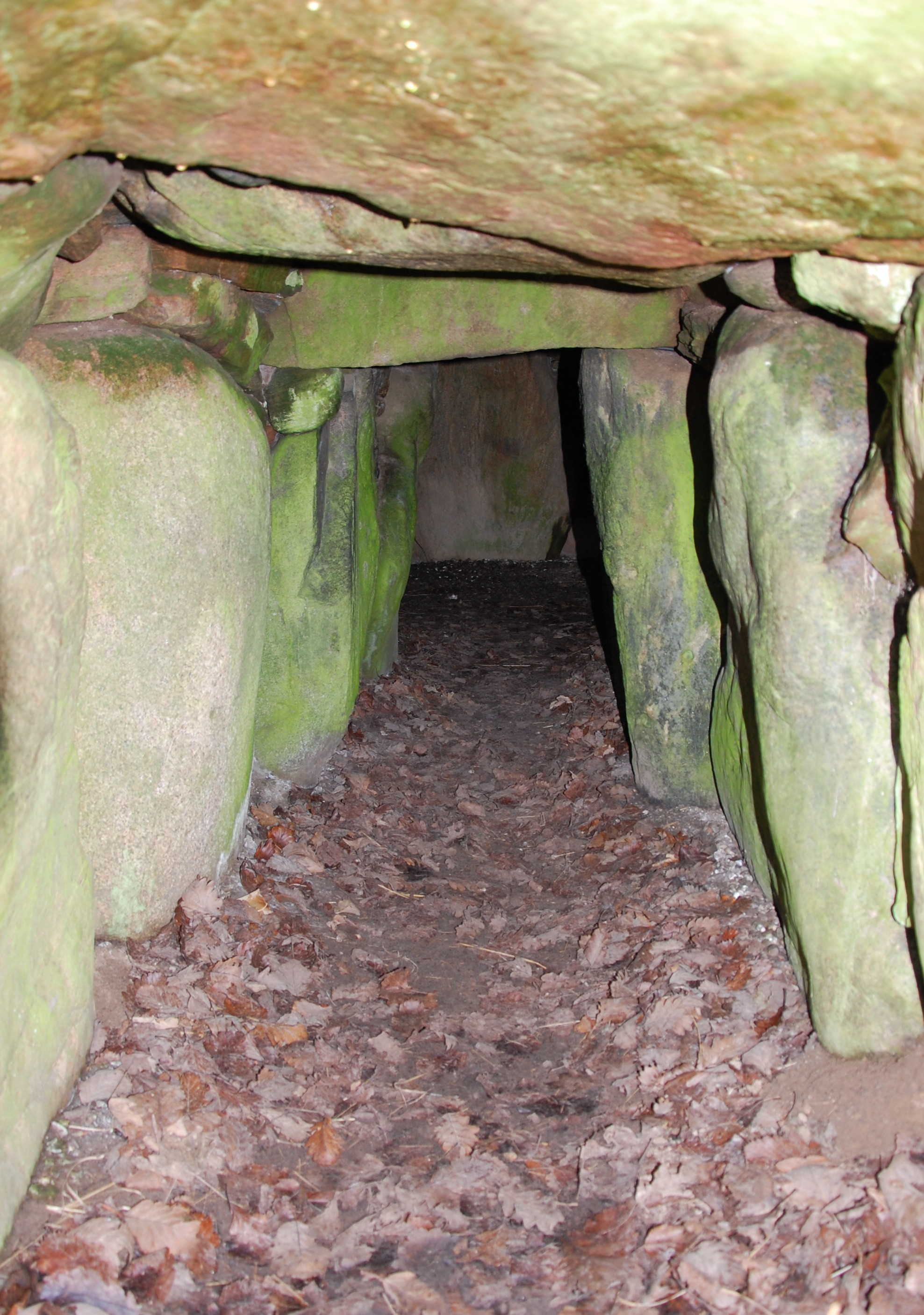 Troldstuerne Gang